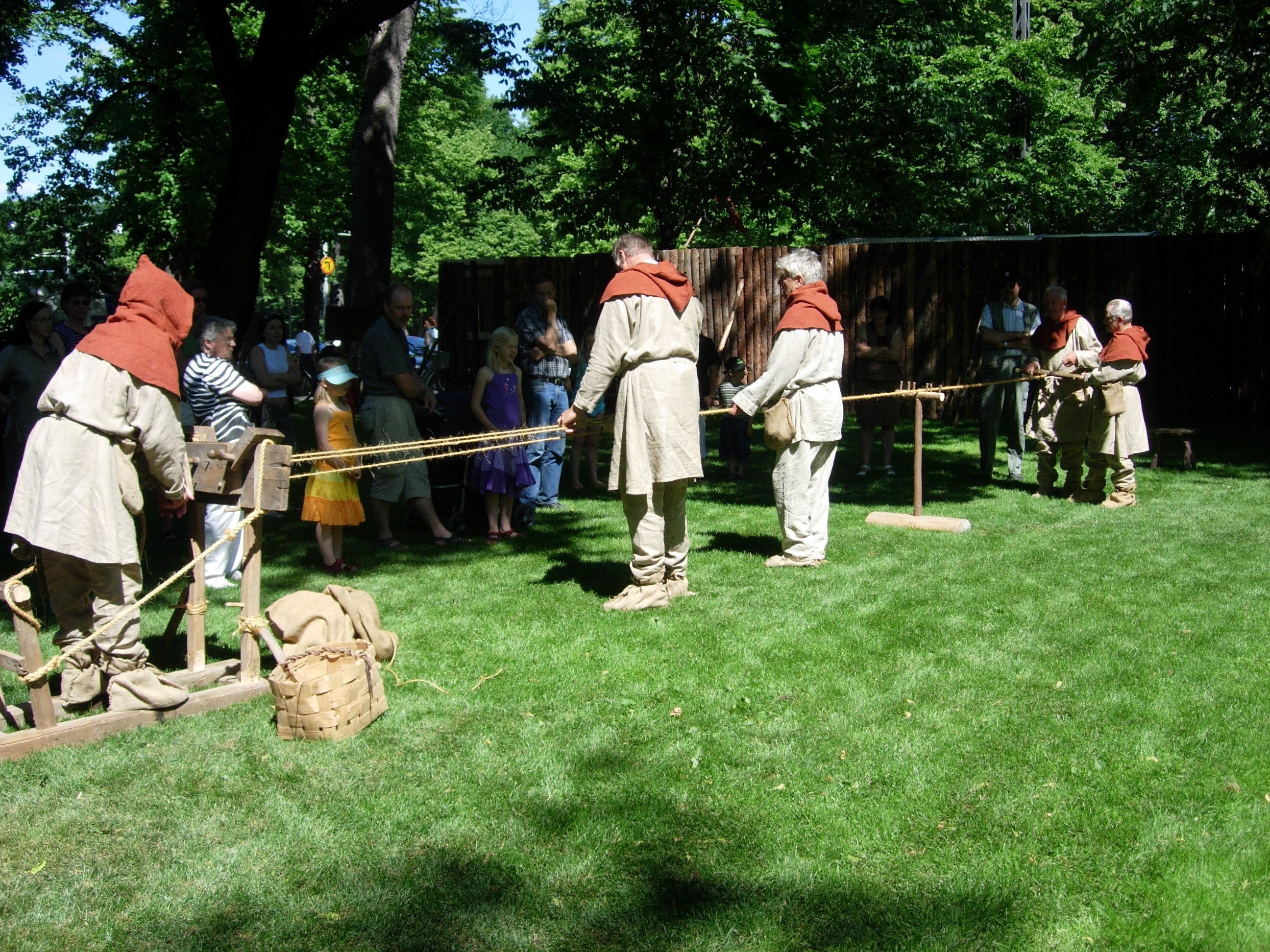 Turku Medieval Market 2005.